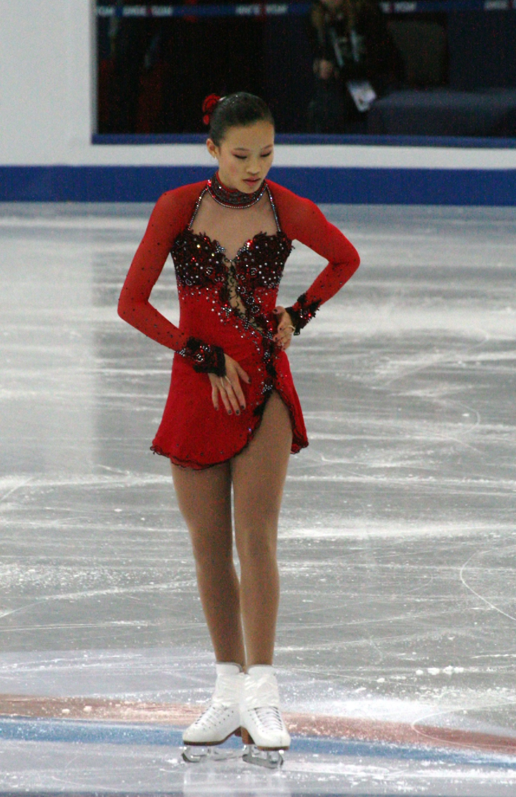 Кристина Гао (США) на финале Гран-при 2012-2013. Произвольная программа.